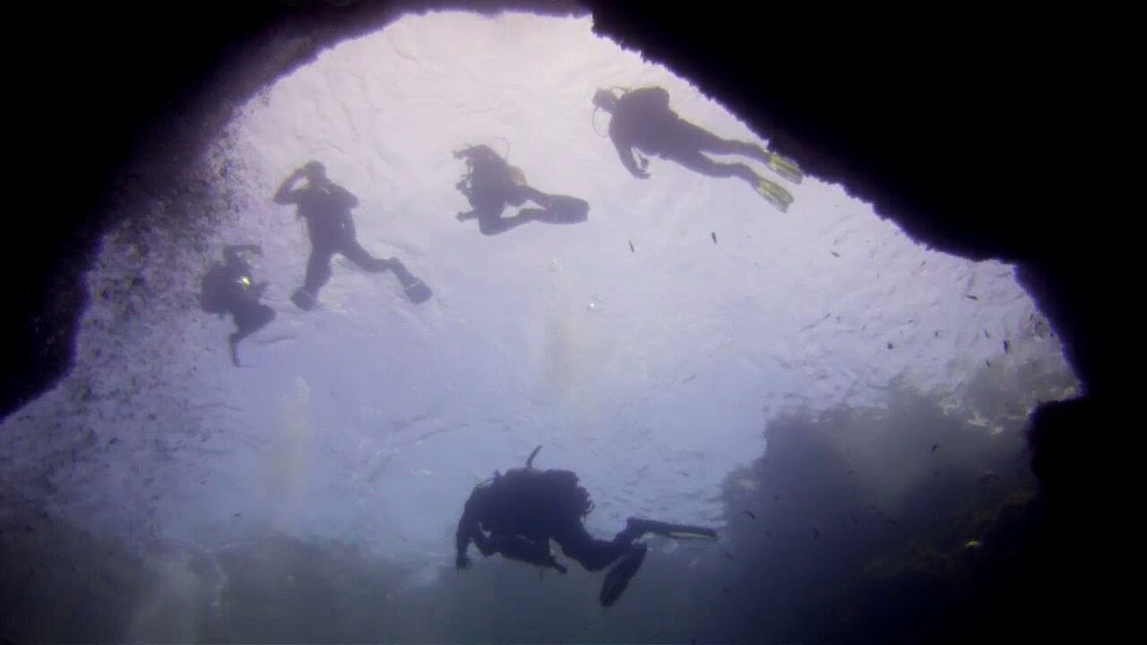 Une autre palanquée vue de la sortie de la grotte